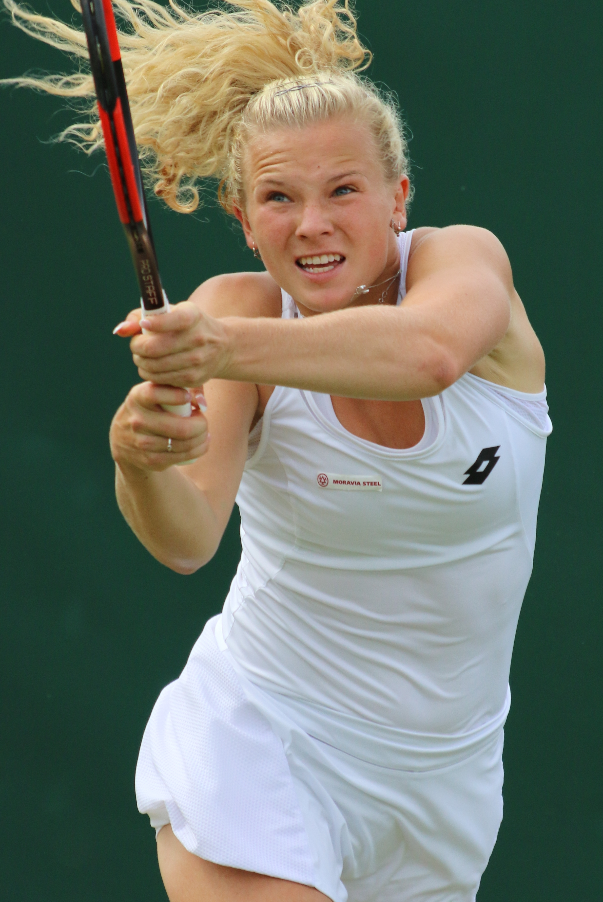 Siniakova WM17 (9)